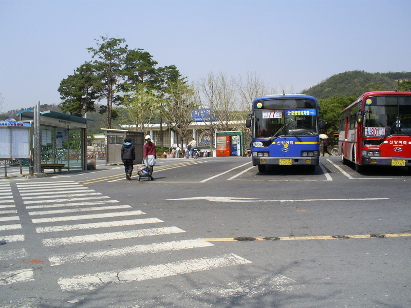 마산역 앞 간이 시내버스 터미널. 촬영장소 : 마산역